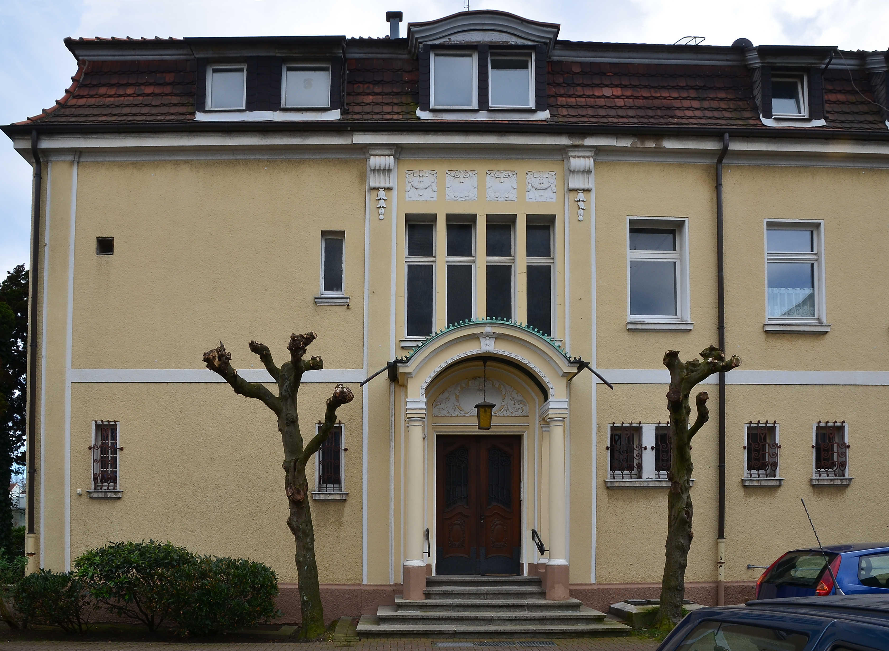 Werl, denkmalgeschützte Villa Wulf, Portalansicht, Steinerstraße 48